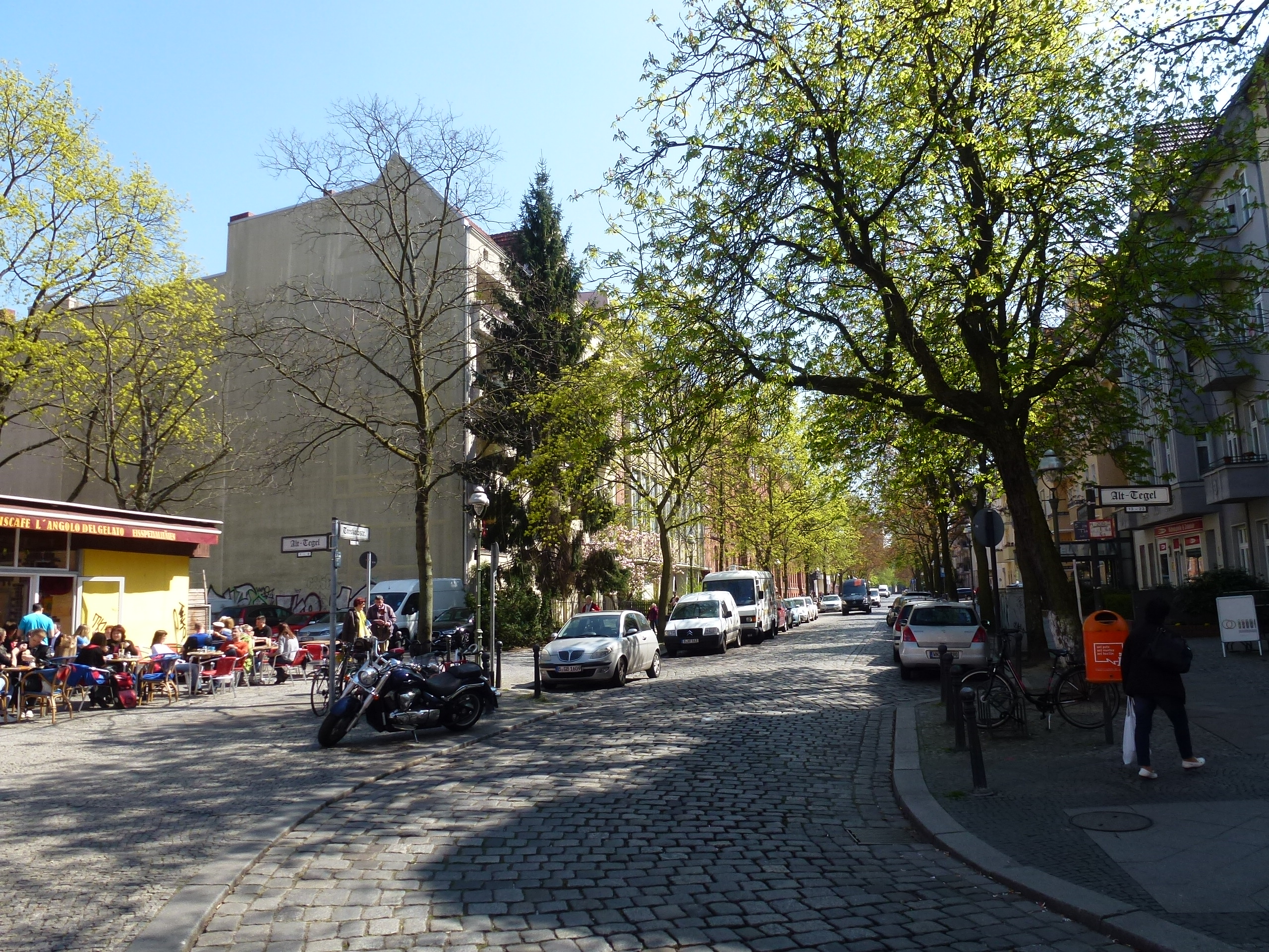 Berlin-Tegel Treskowstraße